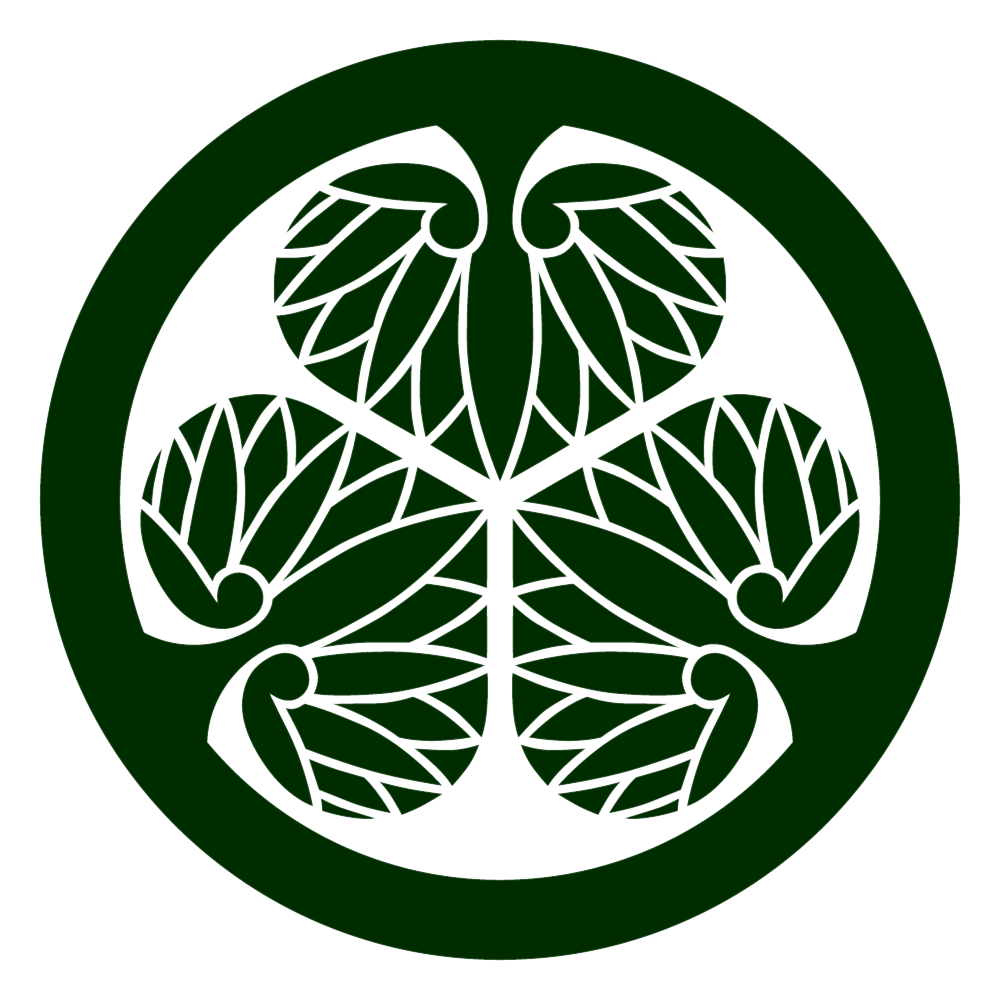 家紋・葵の一種「三つ葉葵」。通称「葵の御紋」「徳川葵」。徳川家康がその初代である徳川将軍家の紋章。